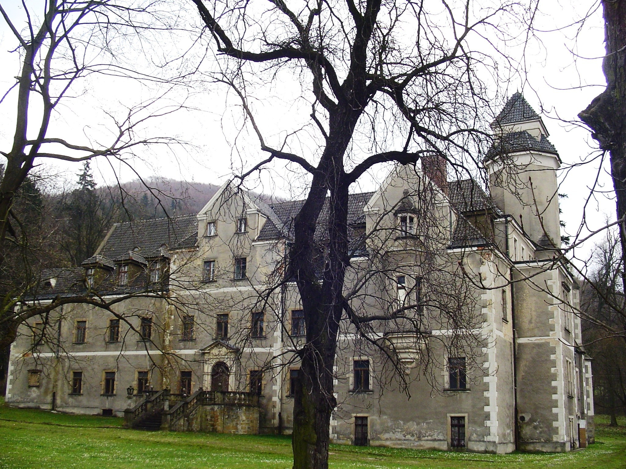 Wojcieszów Górny, ul. Bolesława Chrobrego 48 - pałac, XVII, XIX/XX